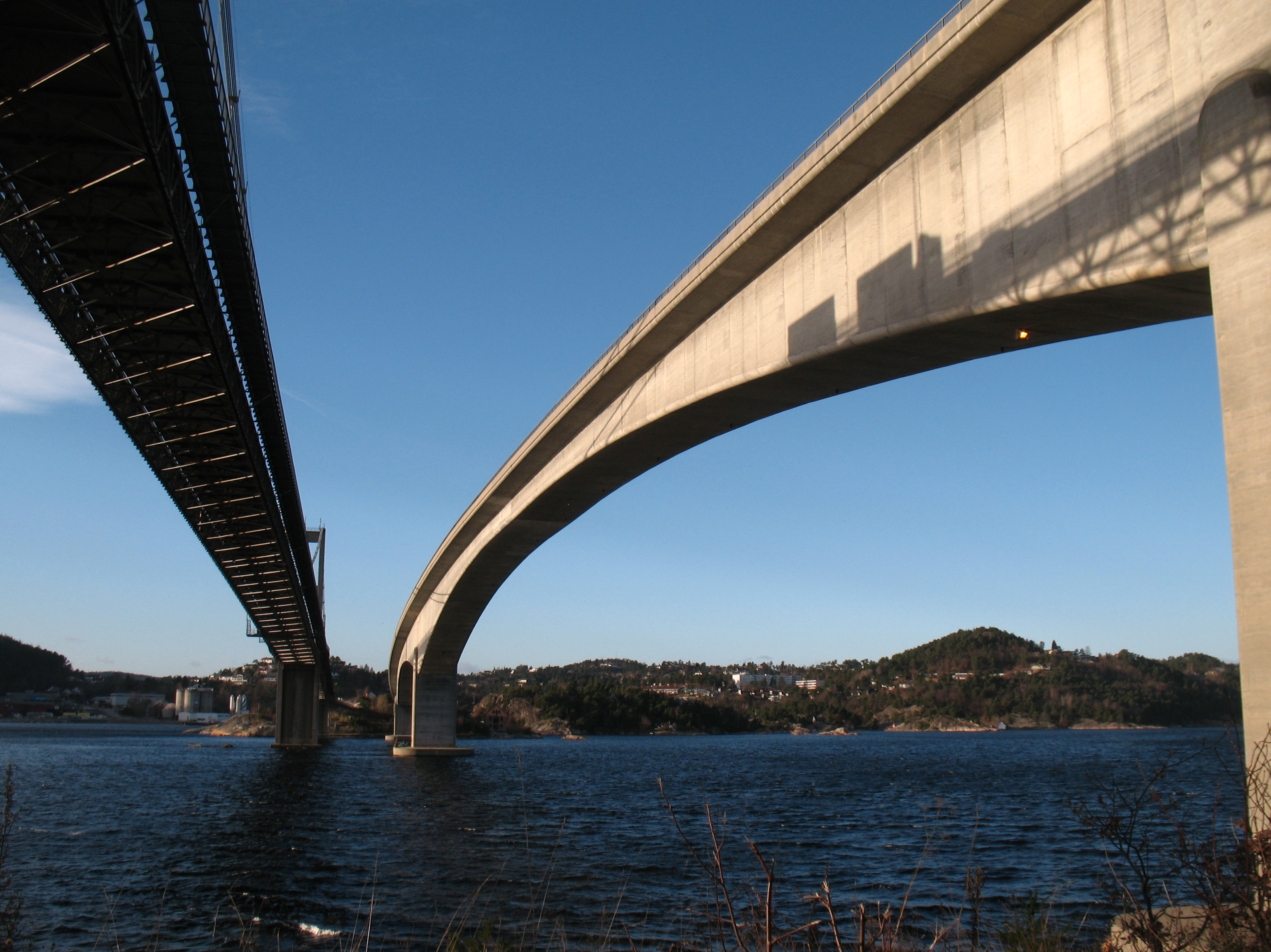 Den gamle (venstre) og nye Varoddbroen (høyre) (E18) sett fra Torsvikveien mot Varodden over Topdalsfjorden.